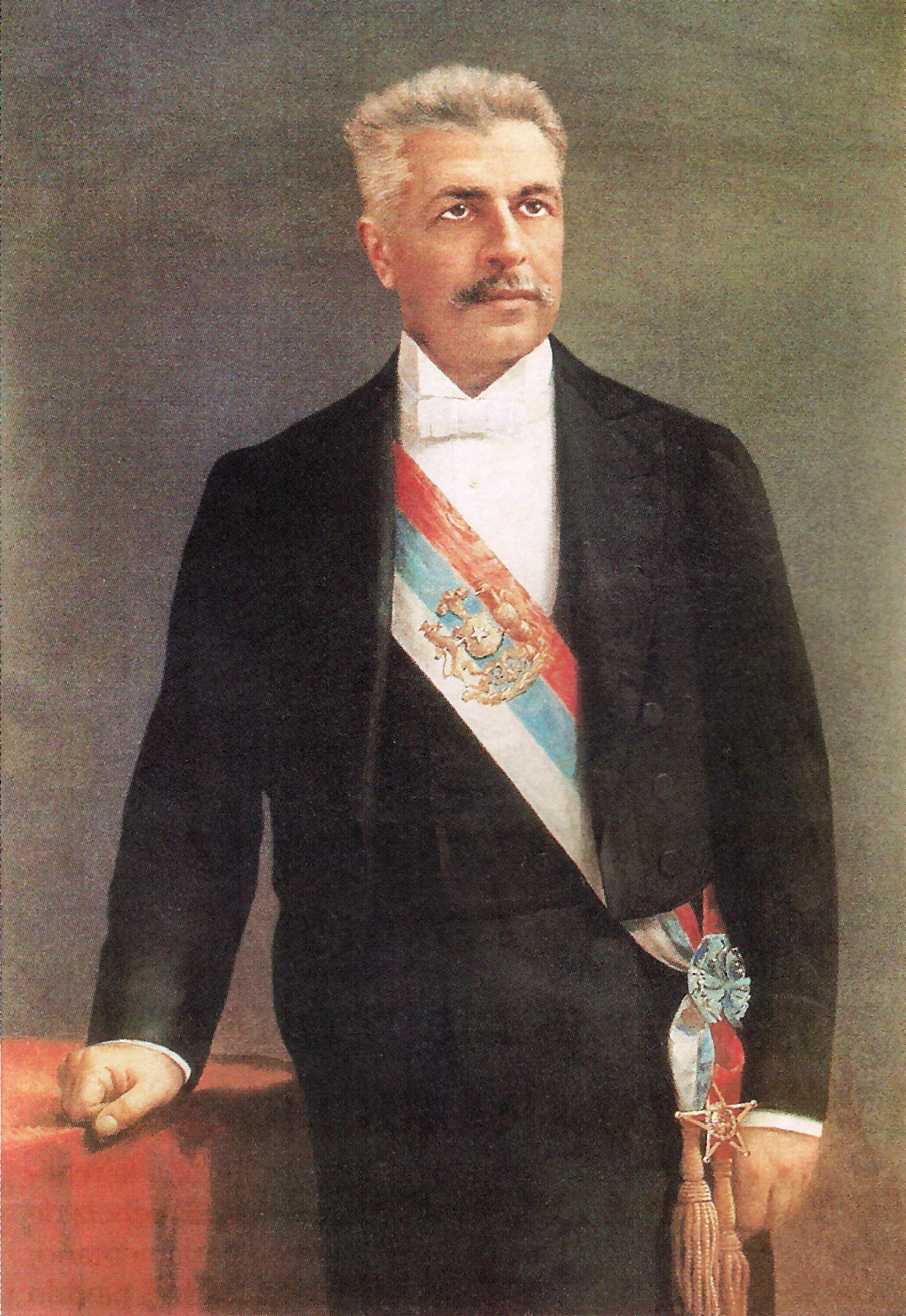 Pedro Elías Pablo Montt Montt (Santiago de Chile, 29 de junio de 1849 – Bremen, Alemania, 16 de agosto de 1910) fue un abogado, presidente de Chile entre los años 1906 y 1910 y ministro en dos presidencias.